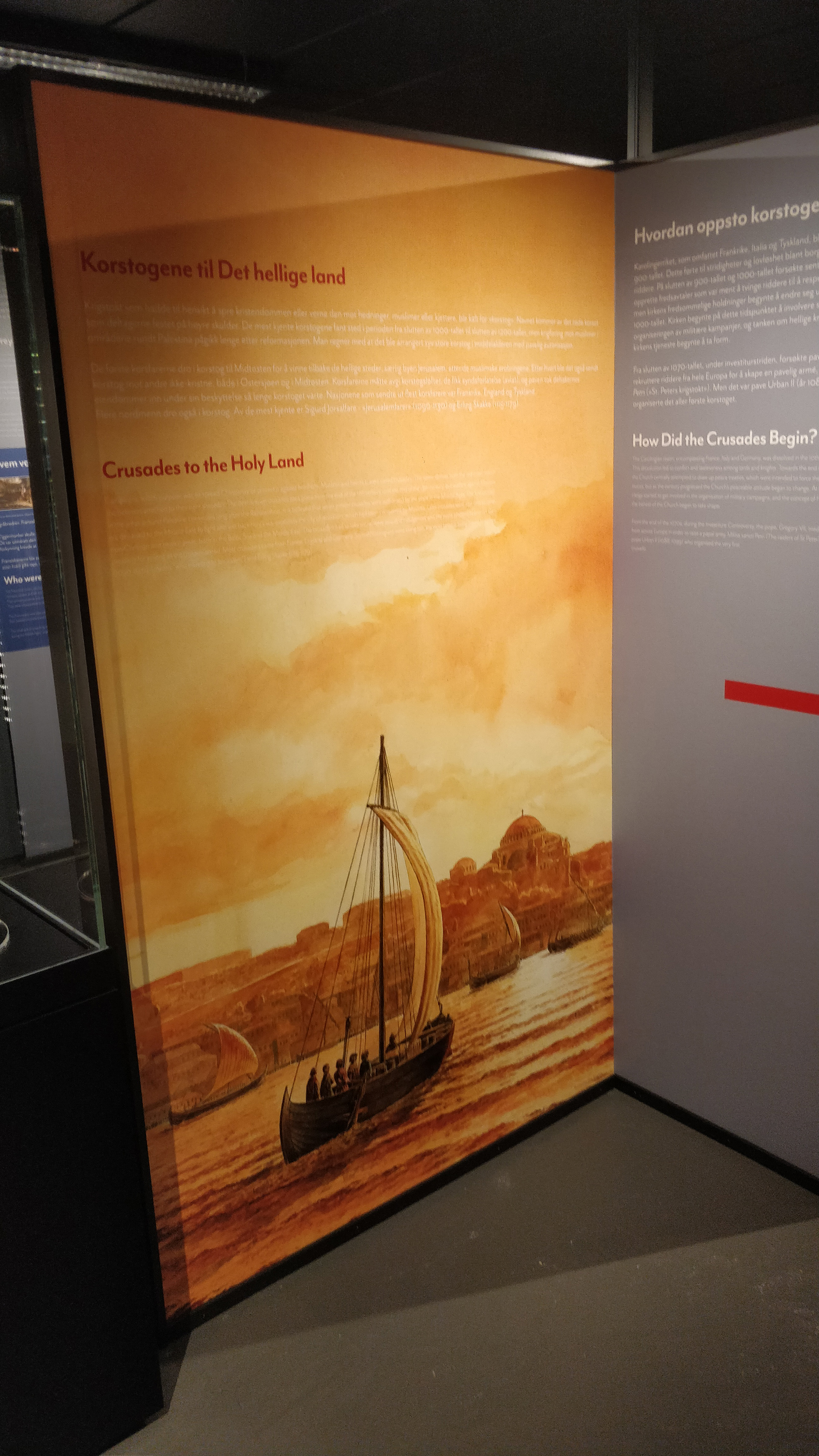 Fra utstillingen Lux - Tro og hellighet i middelalderen: Slottfjellsmuseet, Tønsberg. 2019